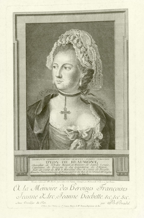 Il Cavalier d'Eon (1728-1810) in abiti femminili. incisione di J. B. Bradel (1779).